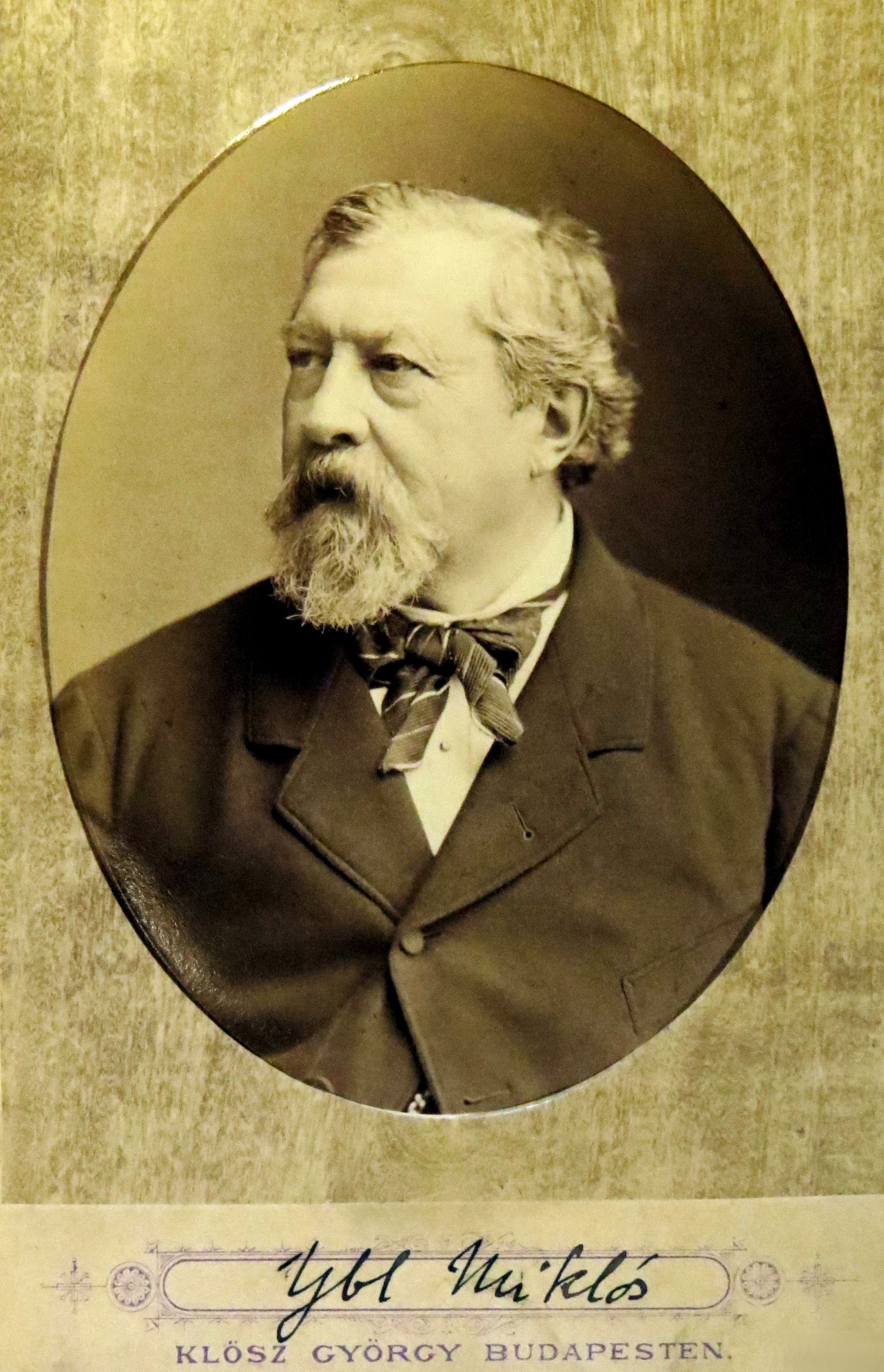 Ybl Miklós portré, Klösz György felvétele